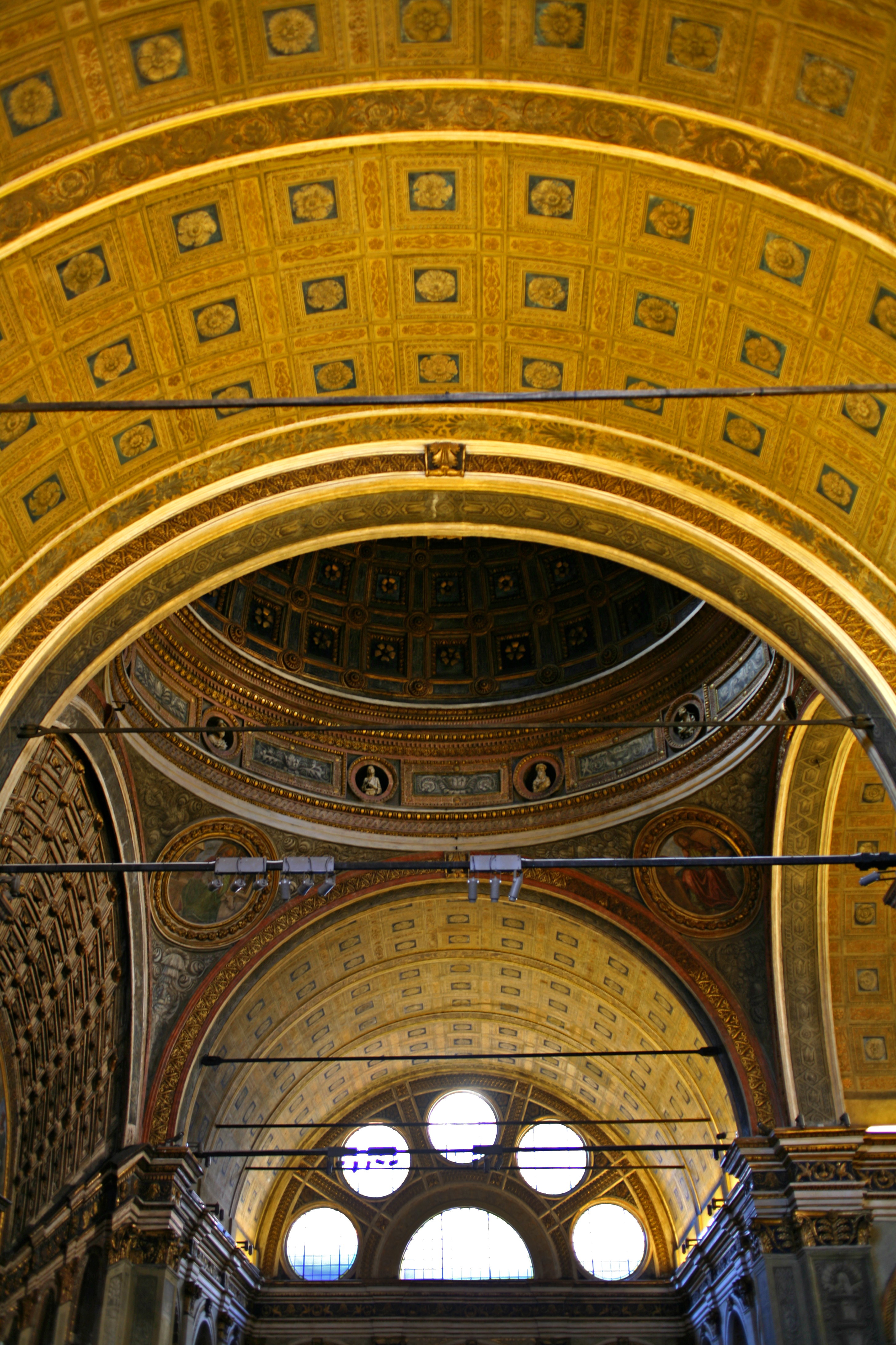 La chiesa di San Satiro a Milano nelle sue viste esterne e interne